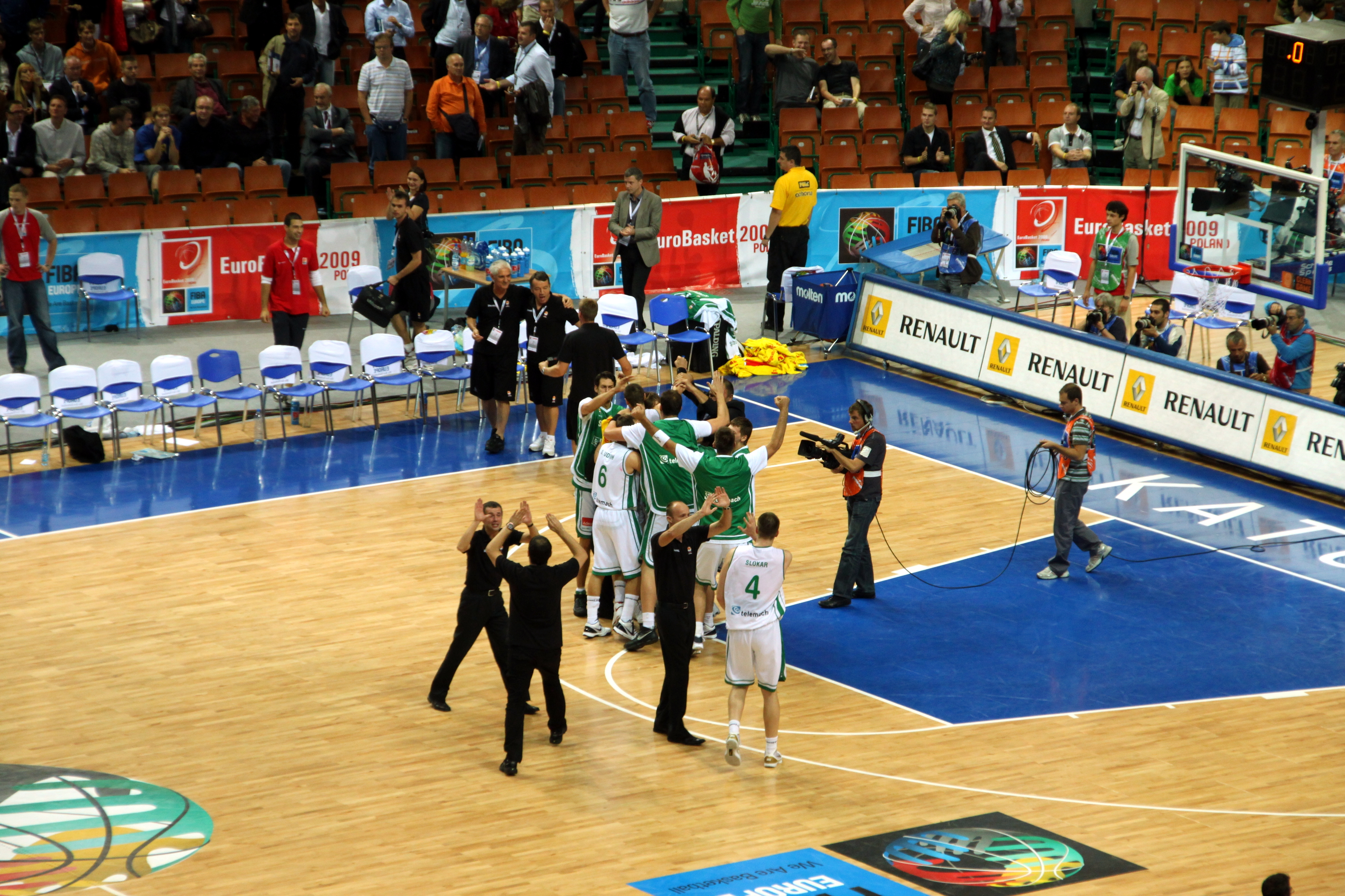 Slovenia - Croatia at Eurobasket 2009